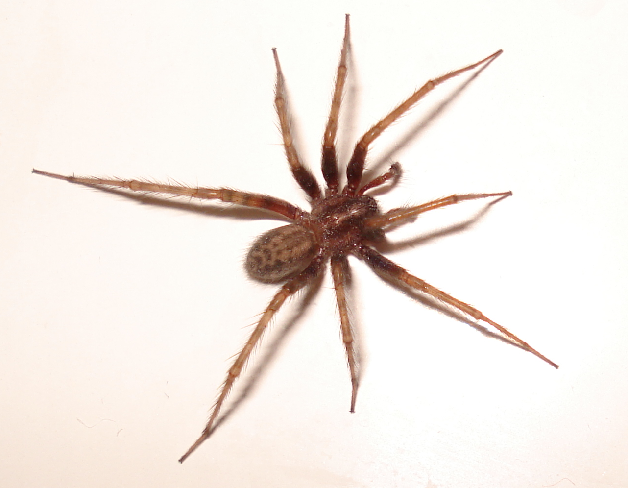 Tegenaria domestica